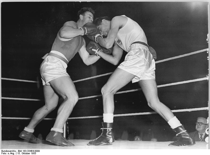 A. Schozinkas, P. James Zentralbild Sport & General Gey-Ho. 9 Motive 15.10.1955 Boxländerkampf England-UdSSR 4:16. Zu einem eindrucksvollen Sieg kam die sowjetische Boxstaffel am Mittwoch in London beim Länderkampf gegen England. Der Gastgeber musste sich im Gesamtergebnis mit 16:4 hoch geschlagen bekennen. UBz: Den einzigen K.0.-Erfolg des Abends errang der europäische Schwergewichtsmeister A. Schozinkas (links), der den Engländer P. James nach drei Niederschlägen bereis in der ersten Runde zur Aufgabe zwang.